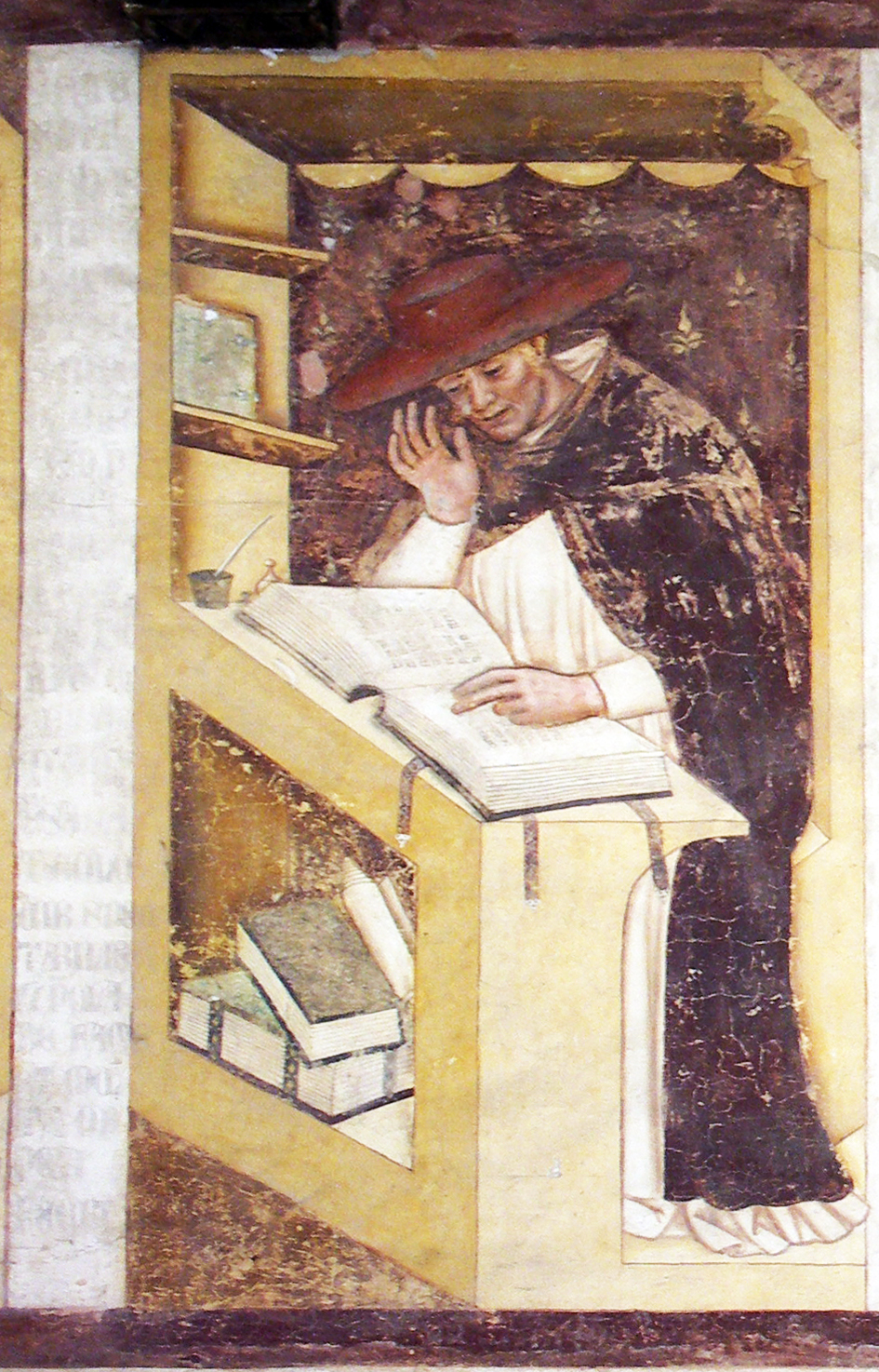 Gualtiero Winterbourne, serie dei Quaranta domenicani illustri, ex convento di San Niccolò, Sala del Capitolo, Treviso, 1352 (altezza di ciascun ritratto 150 cm circa)